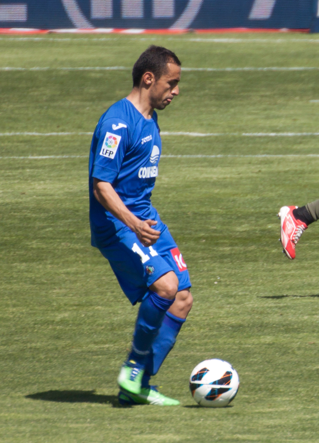 Diego Castro Giménez (Pontevedra, España, 2 de julio de 1982), conocido como Diego Castro, es un futbolista español. Juega de centrocampista. Partido celebrado el 21-04-2013 entre el Getafe C.F. - R.C.D. Español correspondiente a La Liga.